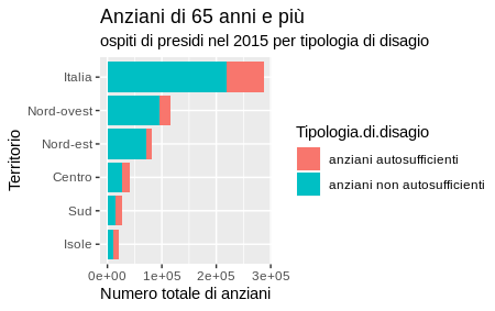 Grafico realizzato con il programma RStudio con dati Istat